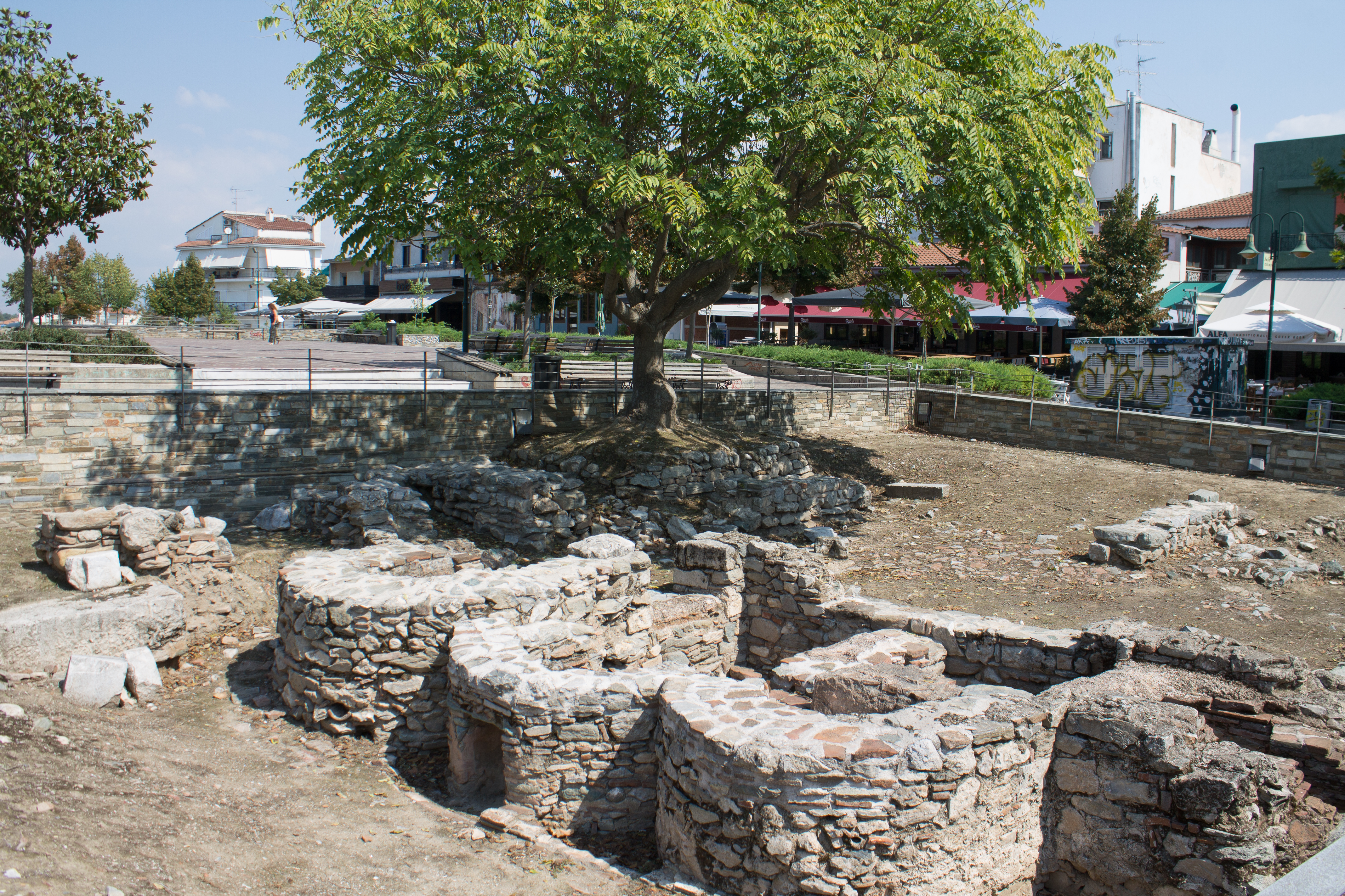 Βυζαντινός ναός και νεκροταφείο«Αρχαιολογικός χώρος Φρουρίου Λάρισας»